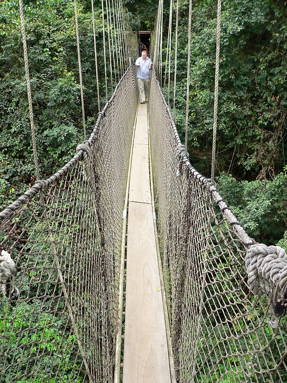 Henrik på første bro.